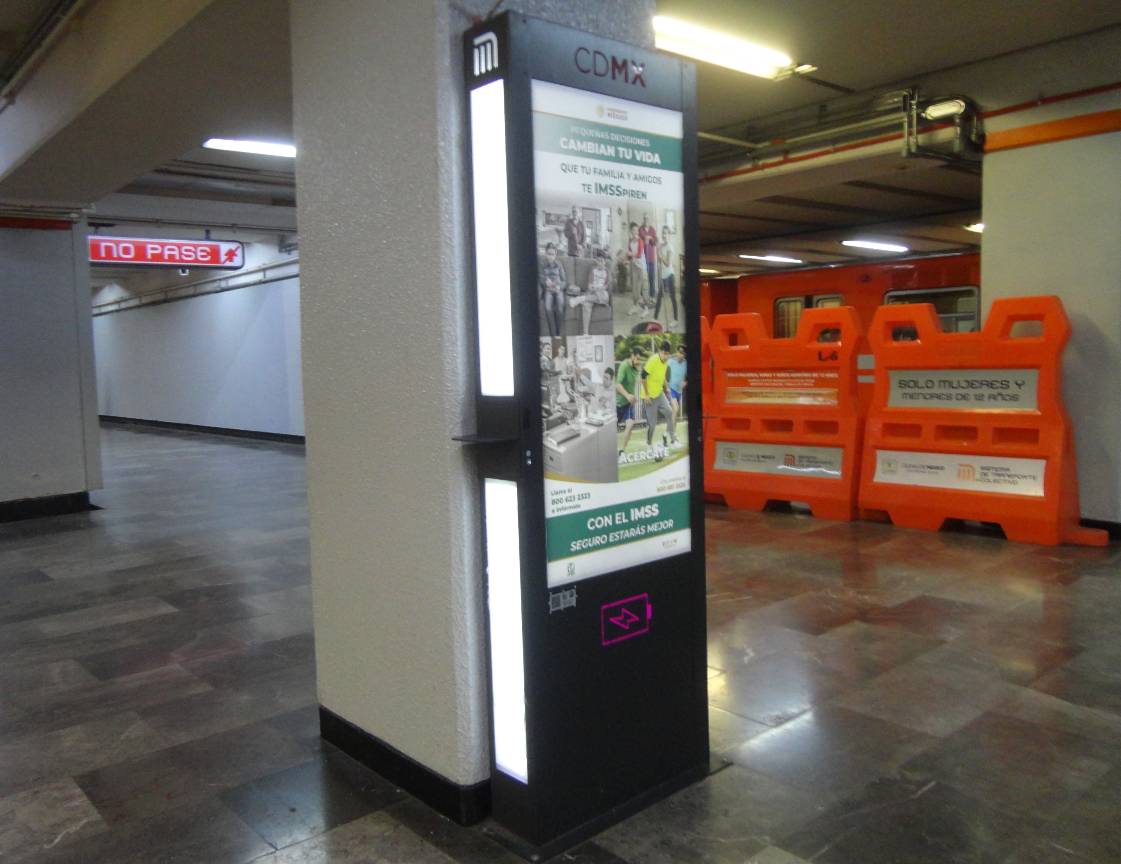 Servicio de carga eléctrica para teléfonos móviles - Metro de la Ciudad de México